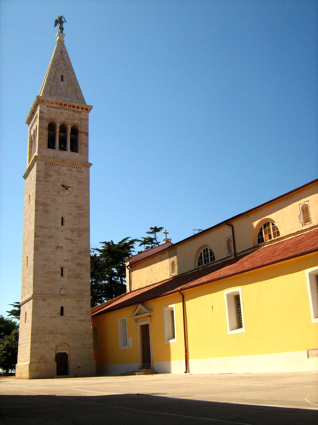 Crkva sv Pelagija u Novigradu